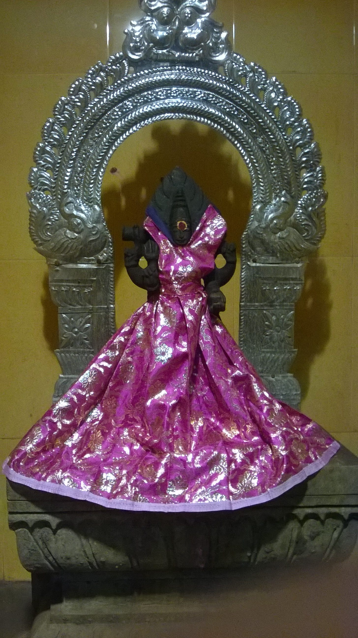 அம்பாள்